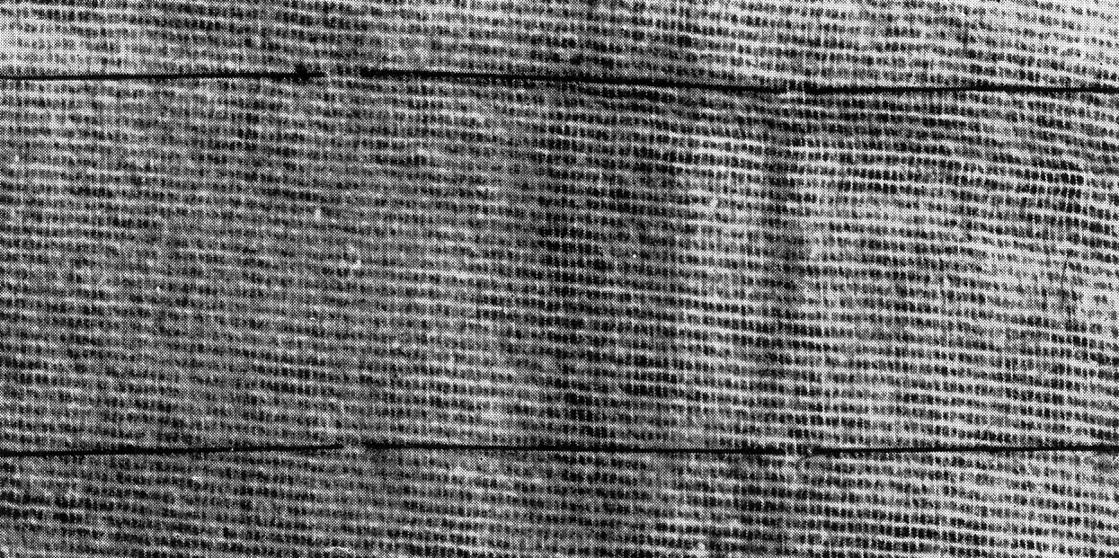 Nähte in der Kürschnerei: „Heftnaht“.